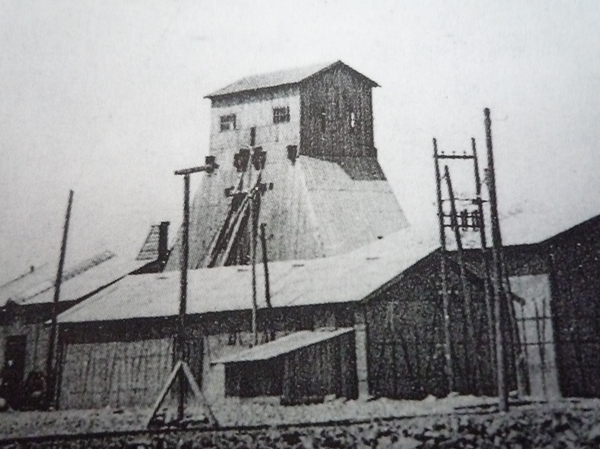 La Fosse n° 1 - 1 bis de la Compagnie des mines de Gouy-Servins et Fresnicourt Réunis était un charbonnage constitué de deux puits situé à Bouvigny-Boyeffles, Pas-de-Calais, Nord-Pas-de-Calais, France. À priori, il s'agit du puits n° 1.